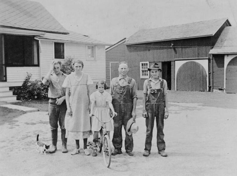 USA, Deutsche Einwandererfamilie Ver.[einigte] Staaten/Michigan: schwäbische Familie bei Ann Arbor vor ihrem Hof